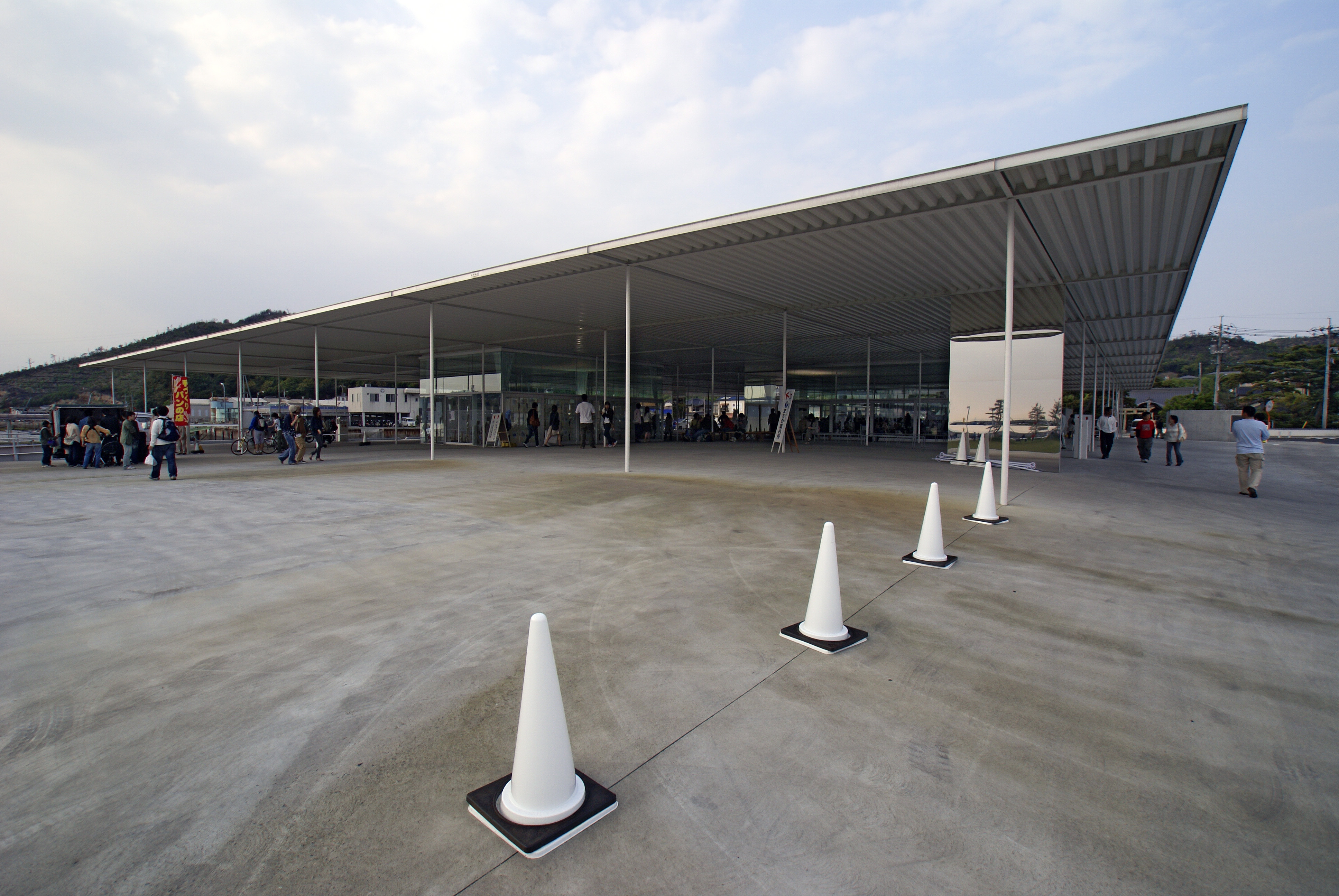 Miyanoura port in Naoshima, Kagawa prefecture, Japan